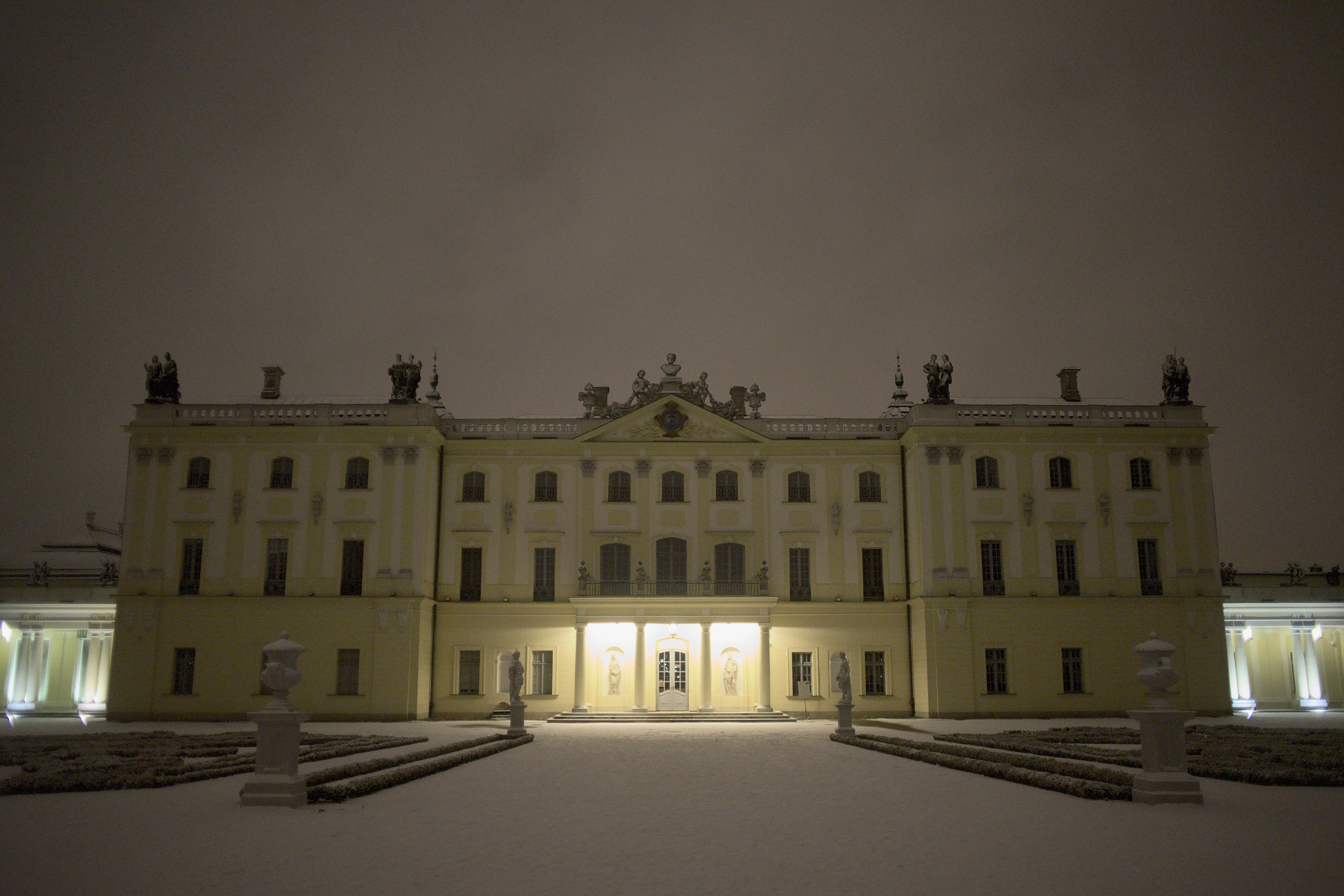 Pałac Branickich